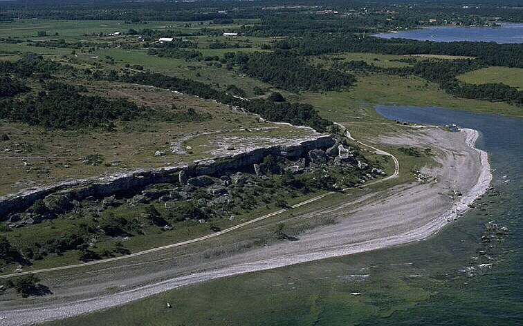 Fornborg. Motiv: Östergarn 13:1 Nyckelord: Flygbilder, Naturreservat, Riksintressen Kategori: Kust- och skärgårdsmiljö, Fornborg Fornborg. Östergarn 13:1.